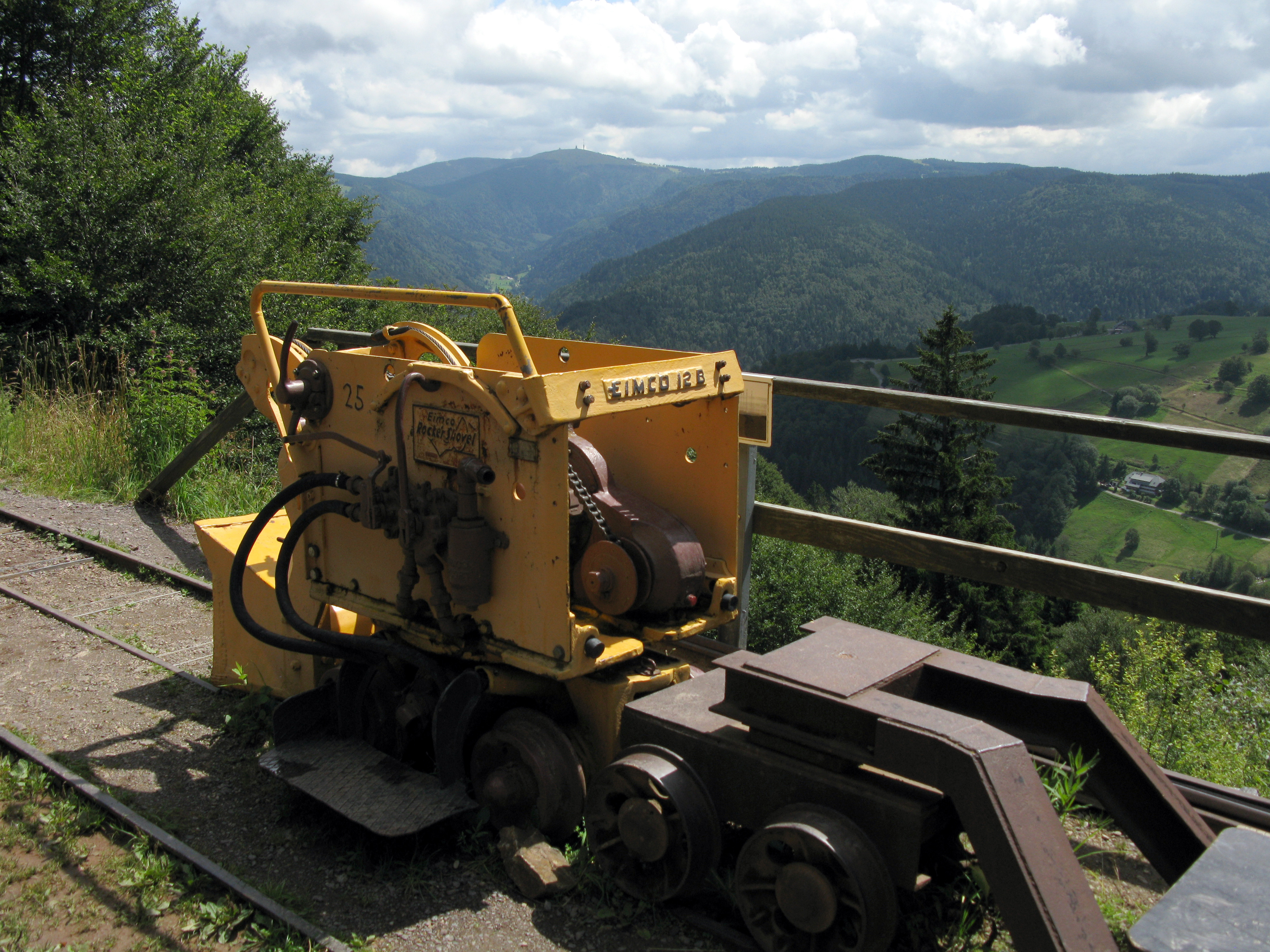 Grubenwagen am Museumsbergwerk Schauinsland mit Blick zum Feldberg